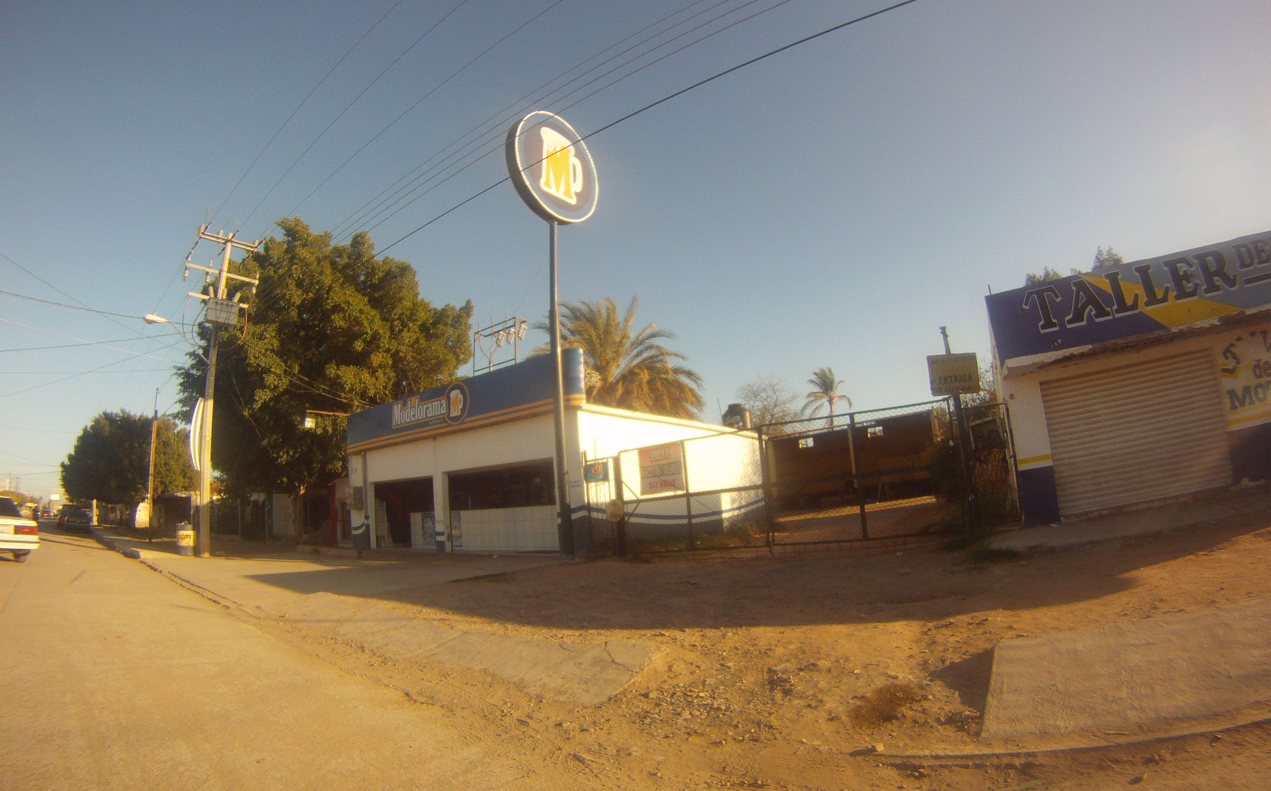 Modelorama Centro